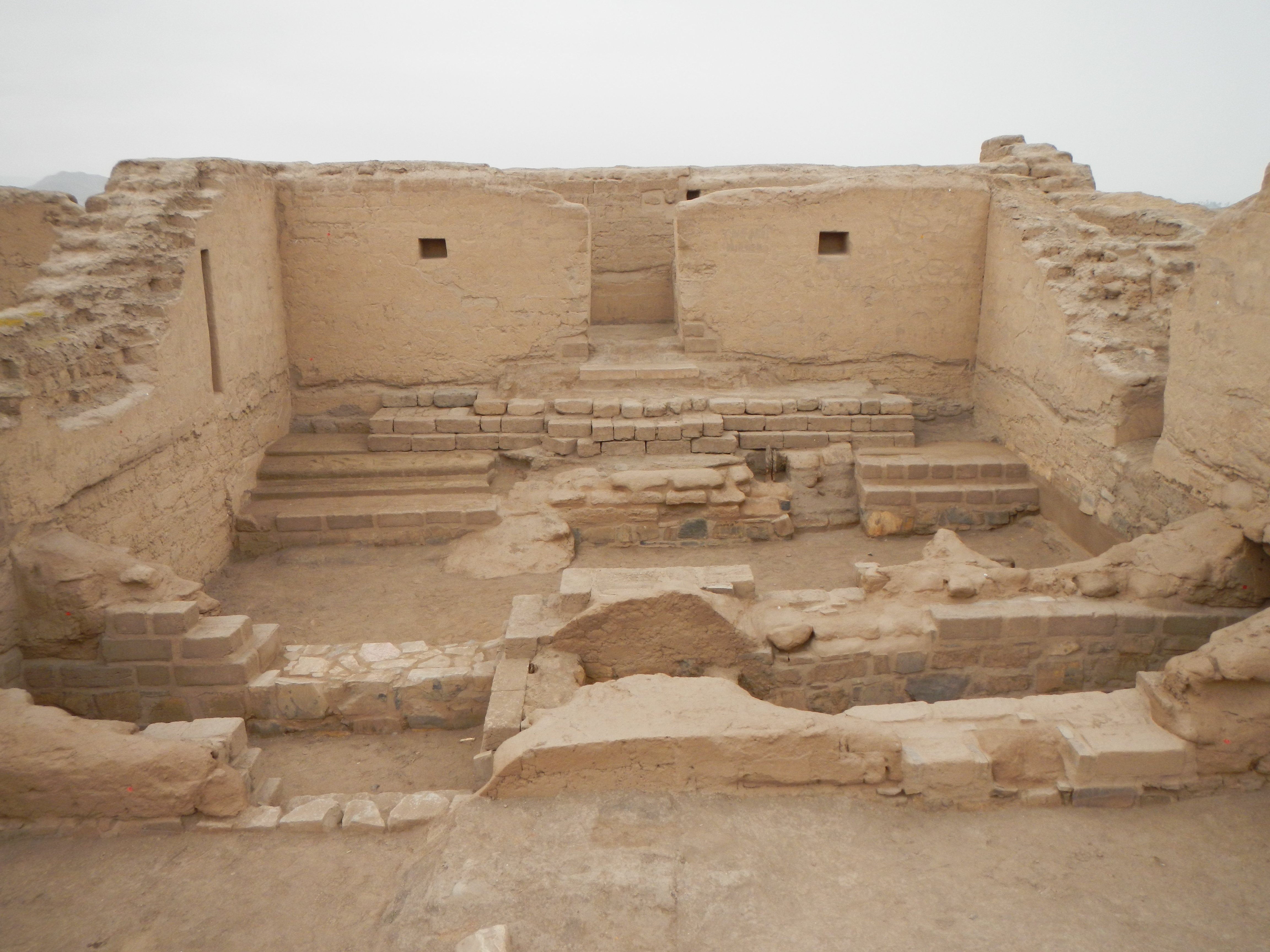 Edificio de Taurichumpi en el santuario arqueológico Pachacamac